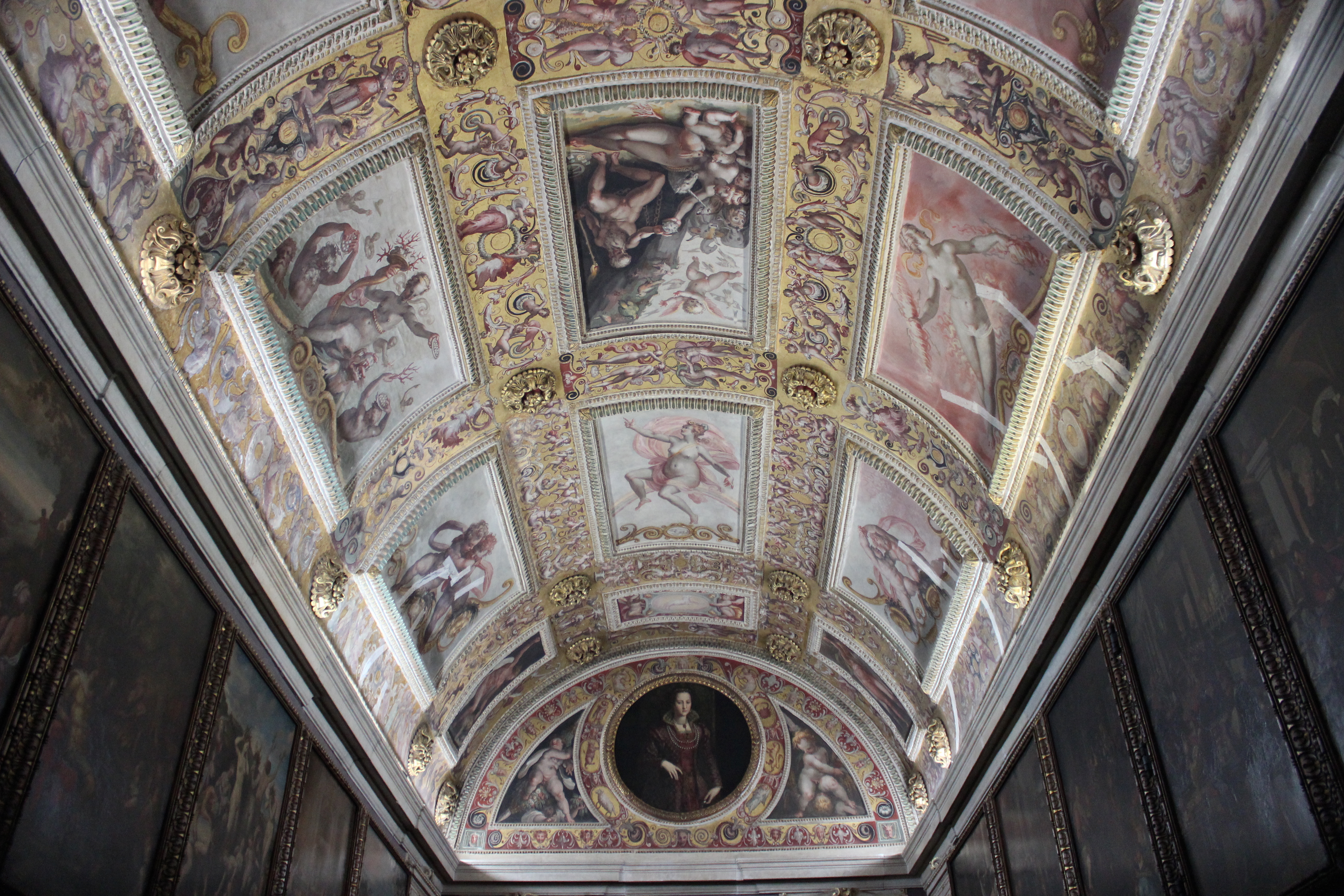 Florencia. Palazzo Vecchio. Studiolo de Francesco I